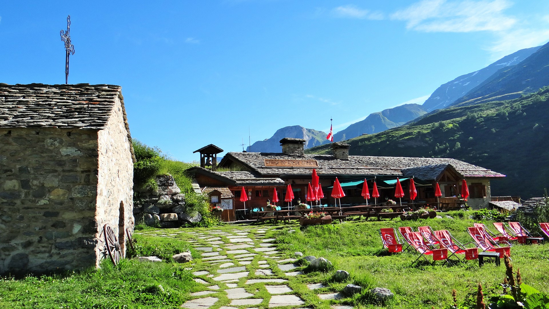 Refuge du Roc de la Pêche et chapelle